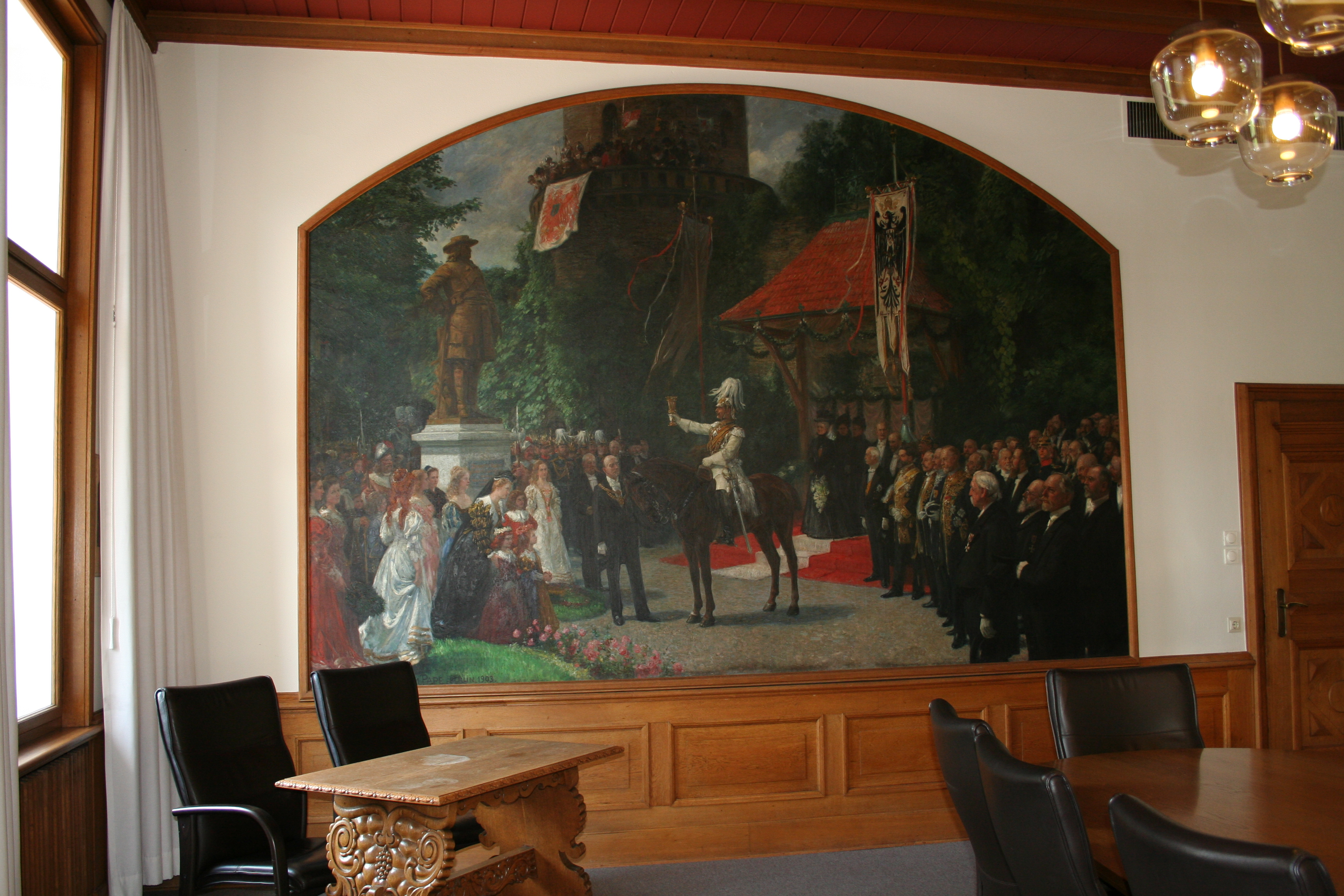 Das Gemälde "Der Graf von Ravensberg seinen Ravensbergern" wurde von 1900 bis 1904 von William Pape gemalt und zeigt die Denkmalenthüllung des Großen Kurfürsten durch Kaiser Wilhelm II. auf der Sparrenburg. Es befindet sich im Nahariya-Raum im Alten Rathaus zu Bielefeld.